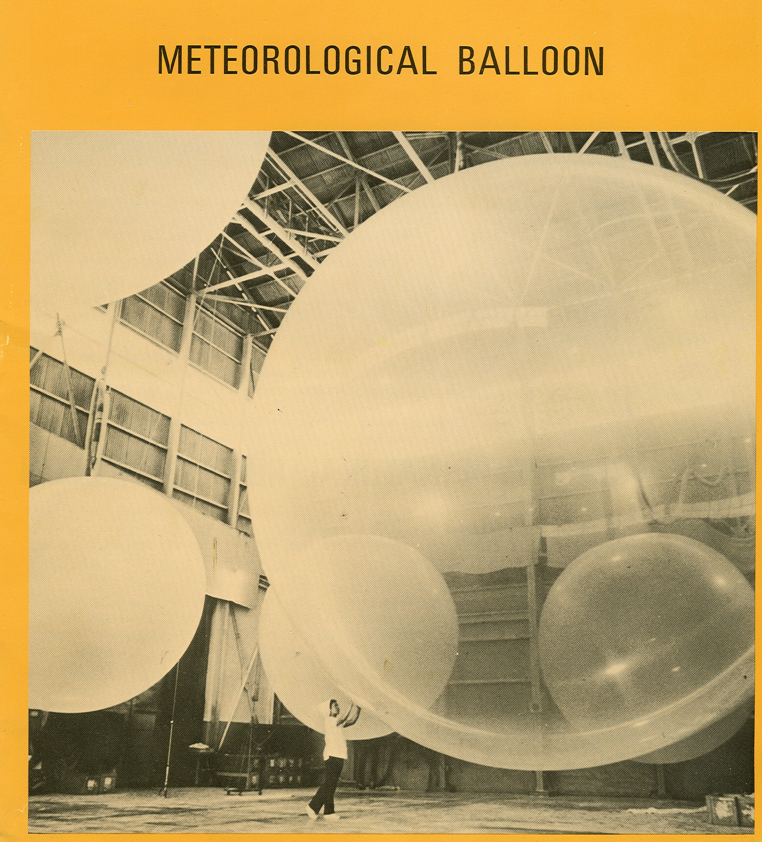 بالون پر شده جهت آزمون میزان کشسانی. تفاوت اندازه حجم بالون با شخص ایستاده مقابل آن چشمگیر است